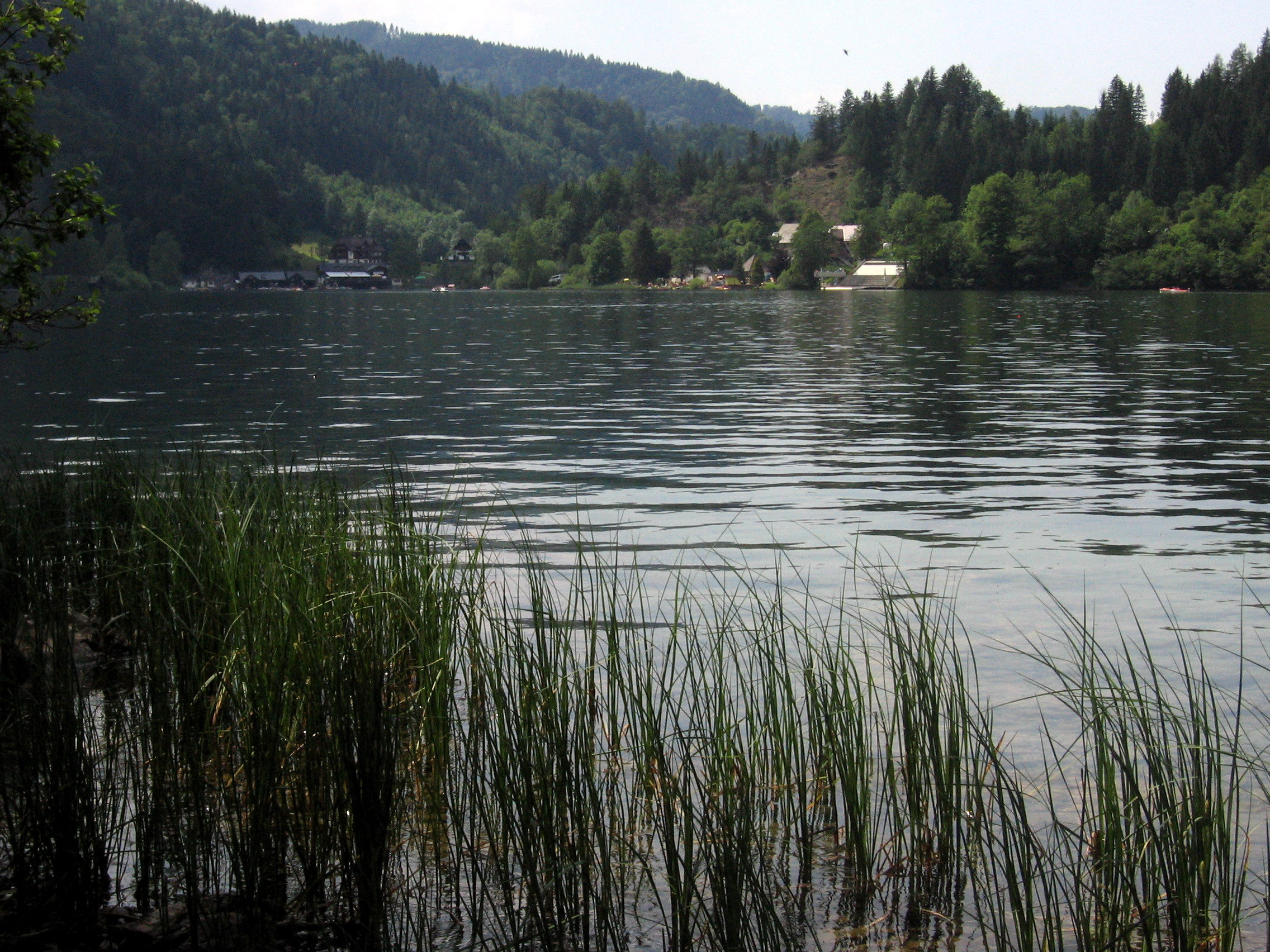 Lunzer See